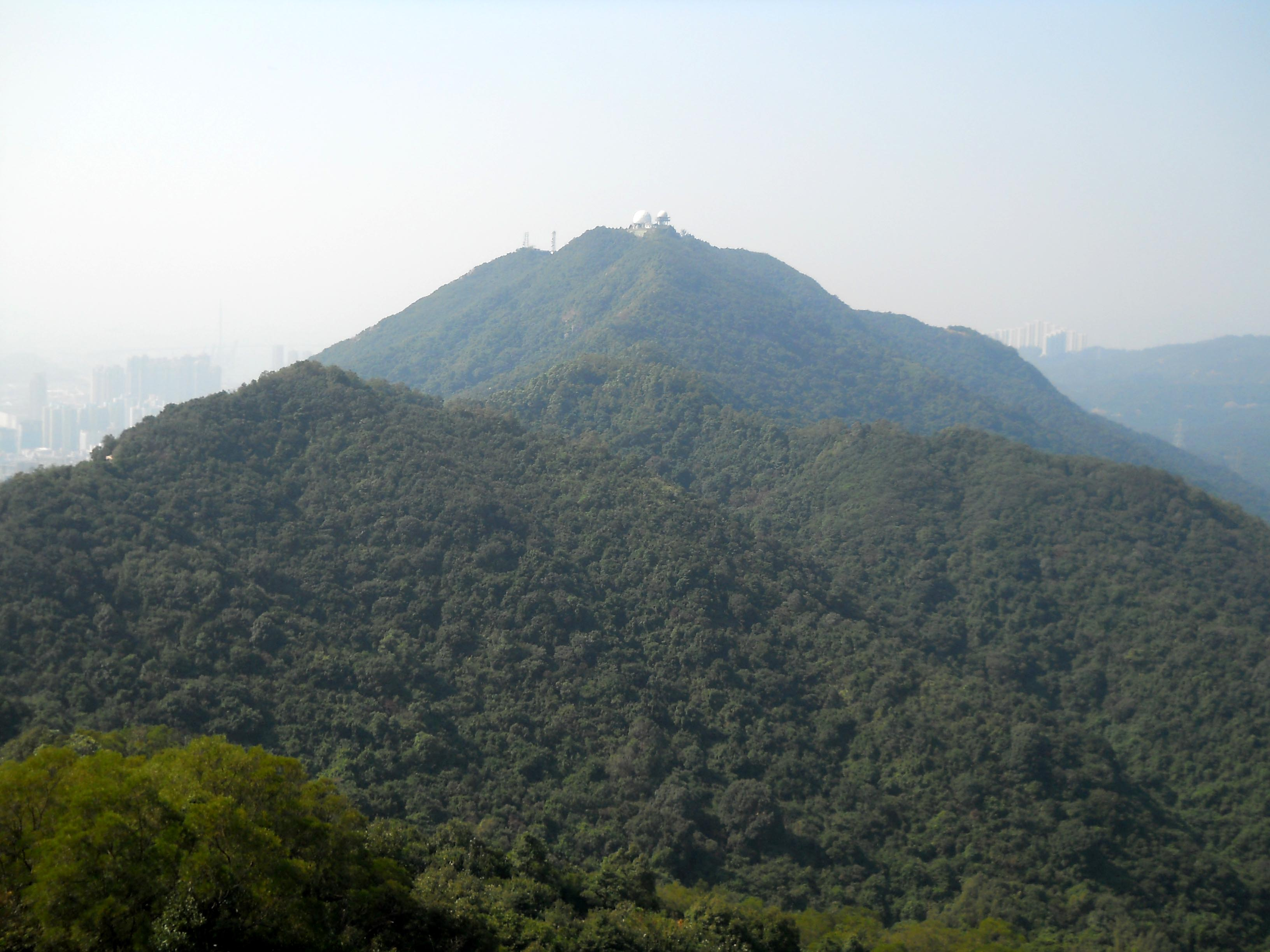 中文（香港）: 筆架山